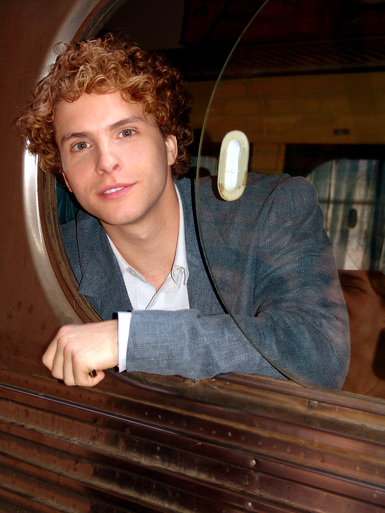 Brazilian actor Thiago Fragoso.Thiago Fragoso